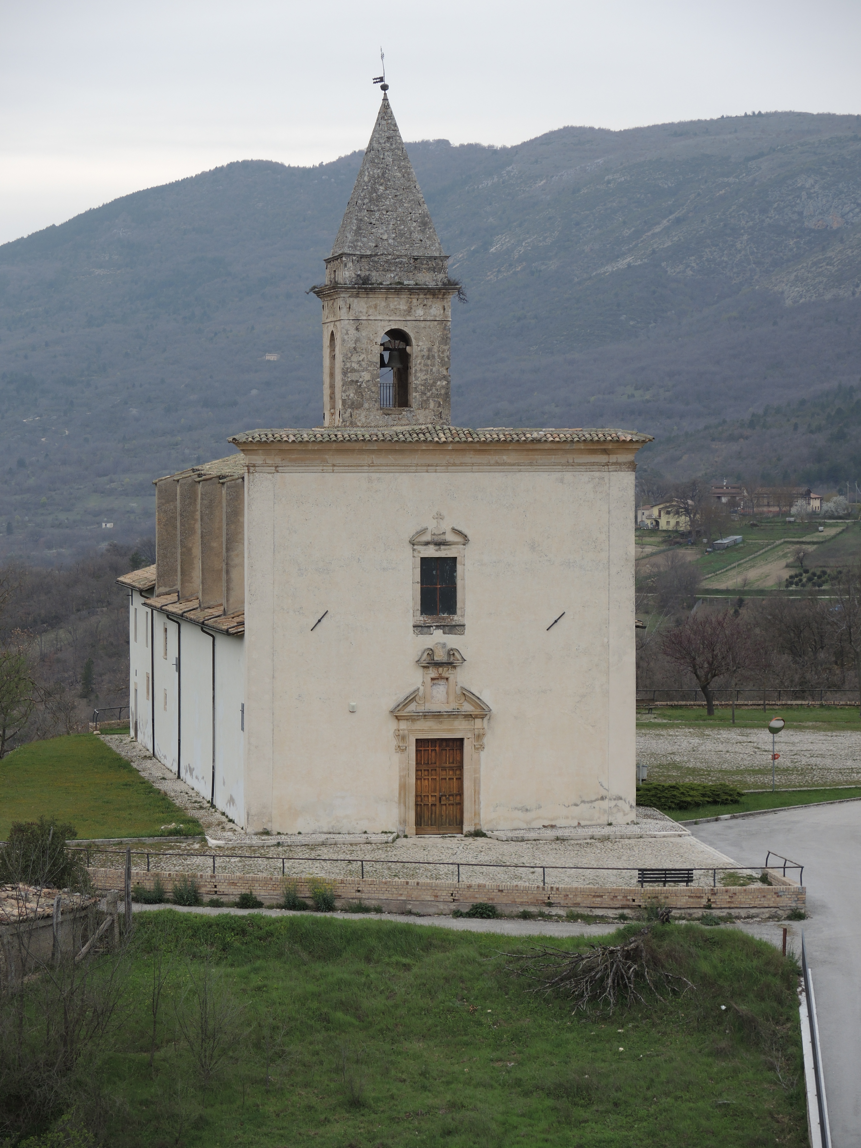 Beffi: Chiesa di San Michele Arcangelo